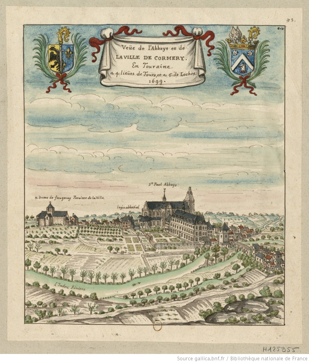 Vue de Cormery; aquarelle de Louis Bourdan (collection Gaignières)